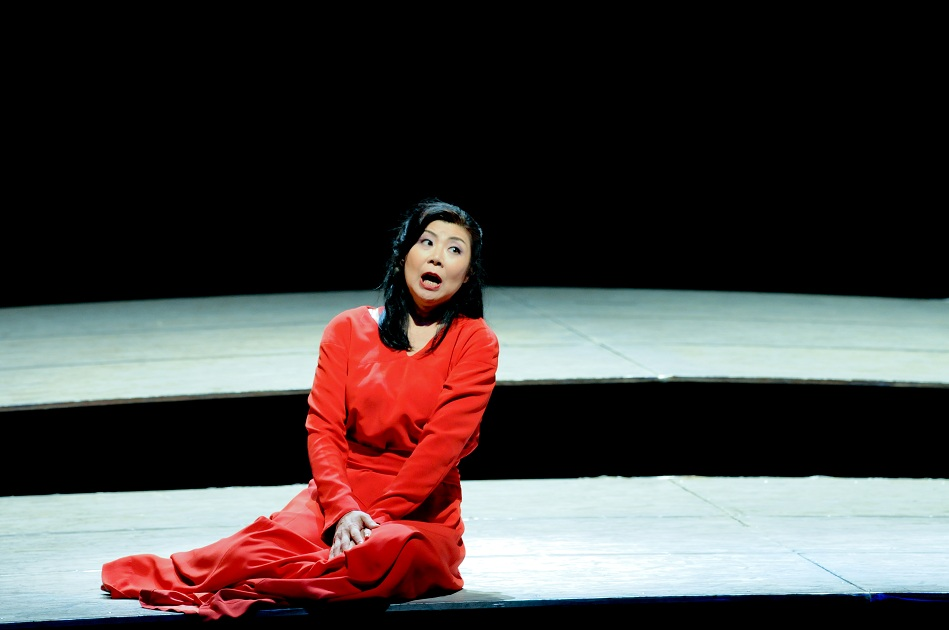 イゾルデ役として出演 びわ湖ホールにて